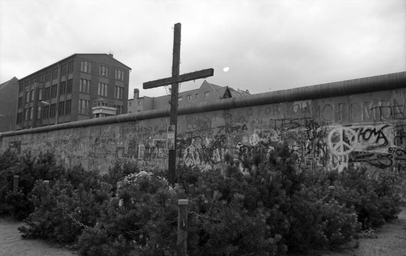 Juni 1988 Berlin (West), die Mauer, Berlin-Kreuzberg